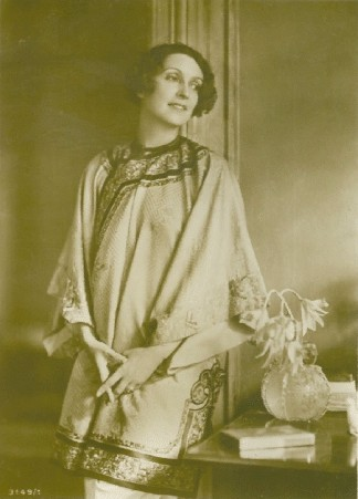 Summary Bildbeschreibung: Erna Morena (1885-1962), Schauspielerin Quelle: Ross Verlag Fotograf/Zeichner: Wanda von Debschitz-Kunowski † 23. April 1935 in Berlin Datum: ... andere Versionen: ...